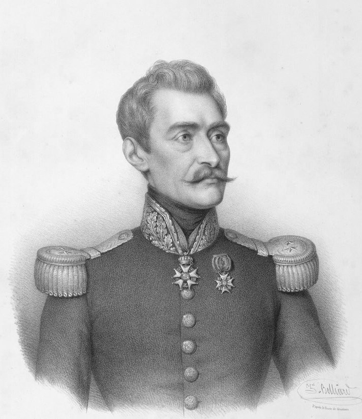 De Bréa.